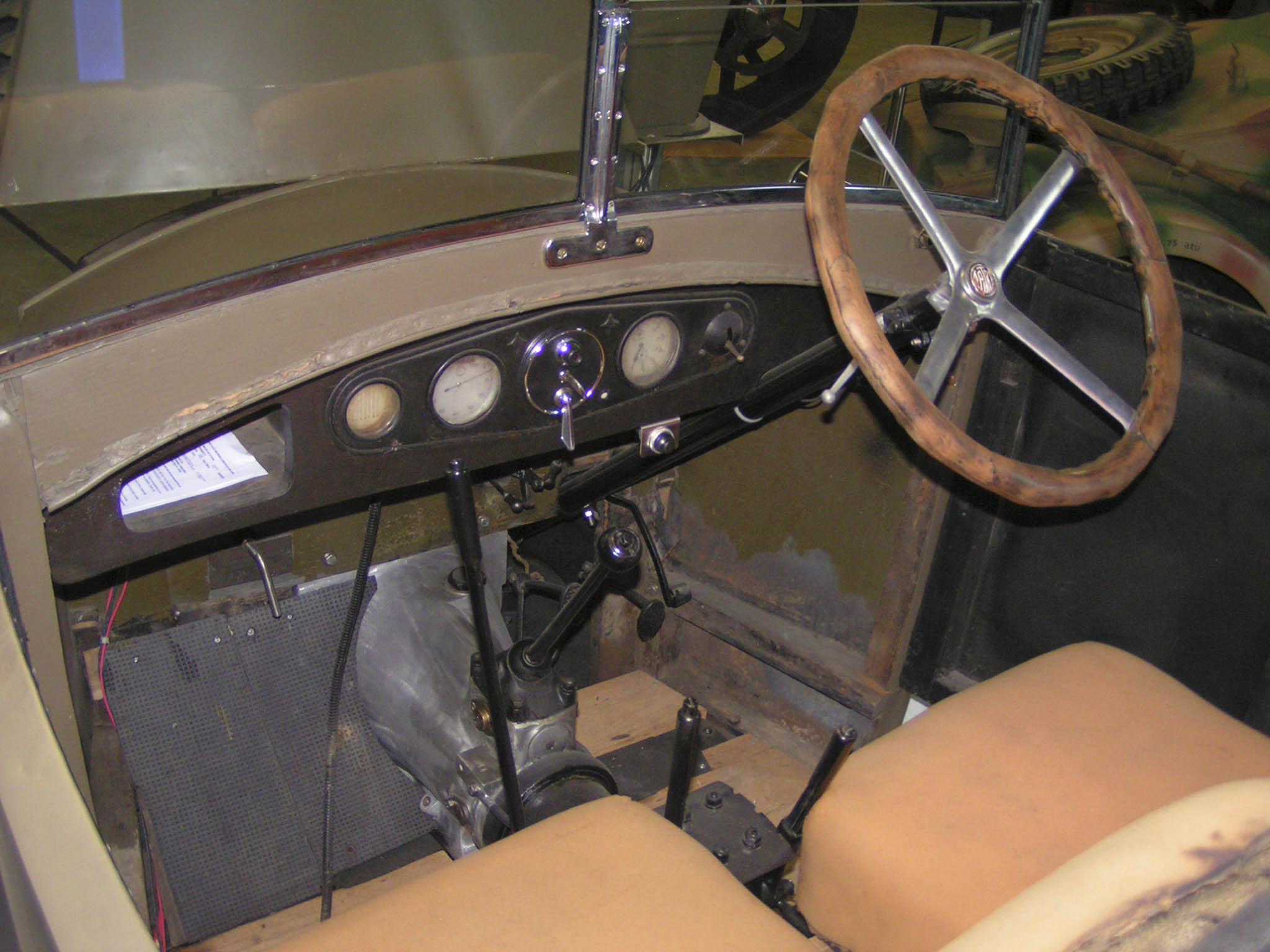 Tatra T26-30 Interior